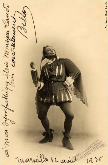 Portrait d'artiste du baryton Etienne Billot